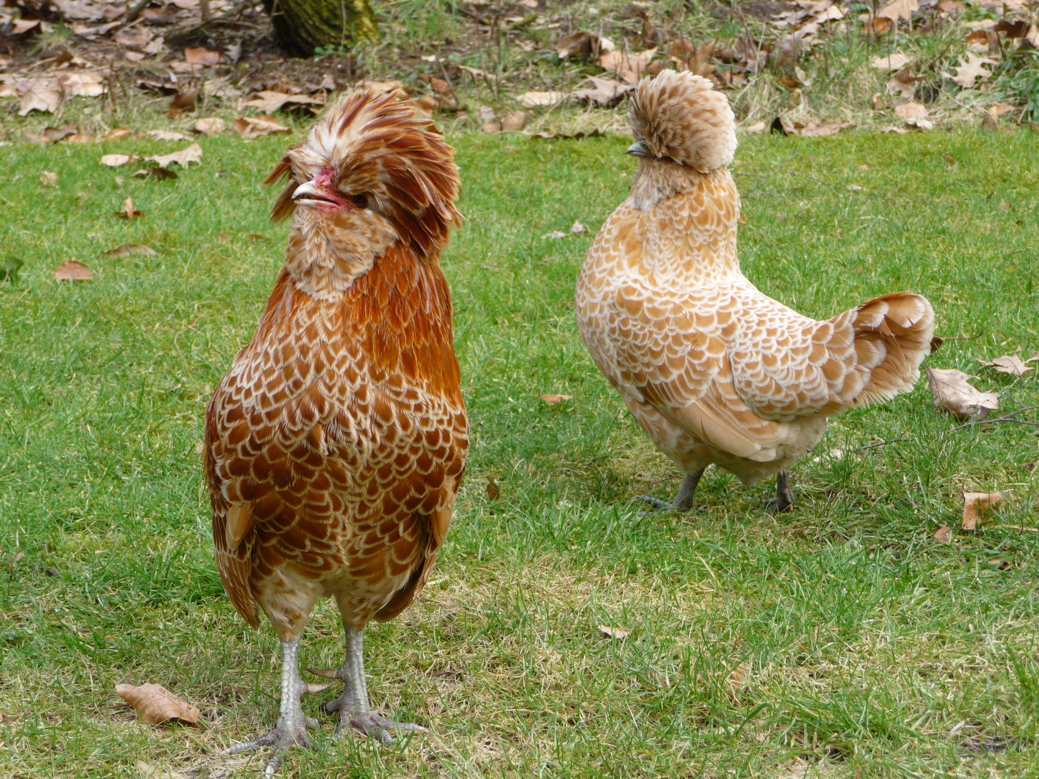 een geel-witgezoomd baardkuifhoen paar